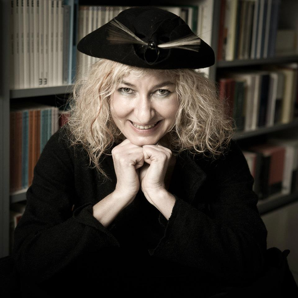 Alessandra Celletti alla Libreria Pellicanolibri; foto Marco Pasqua